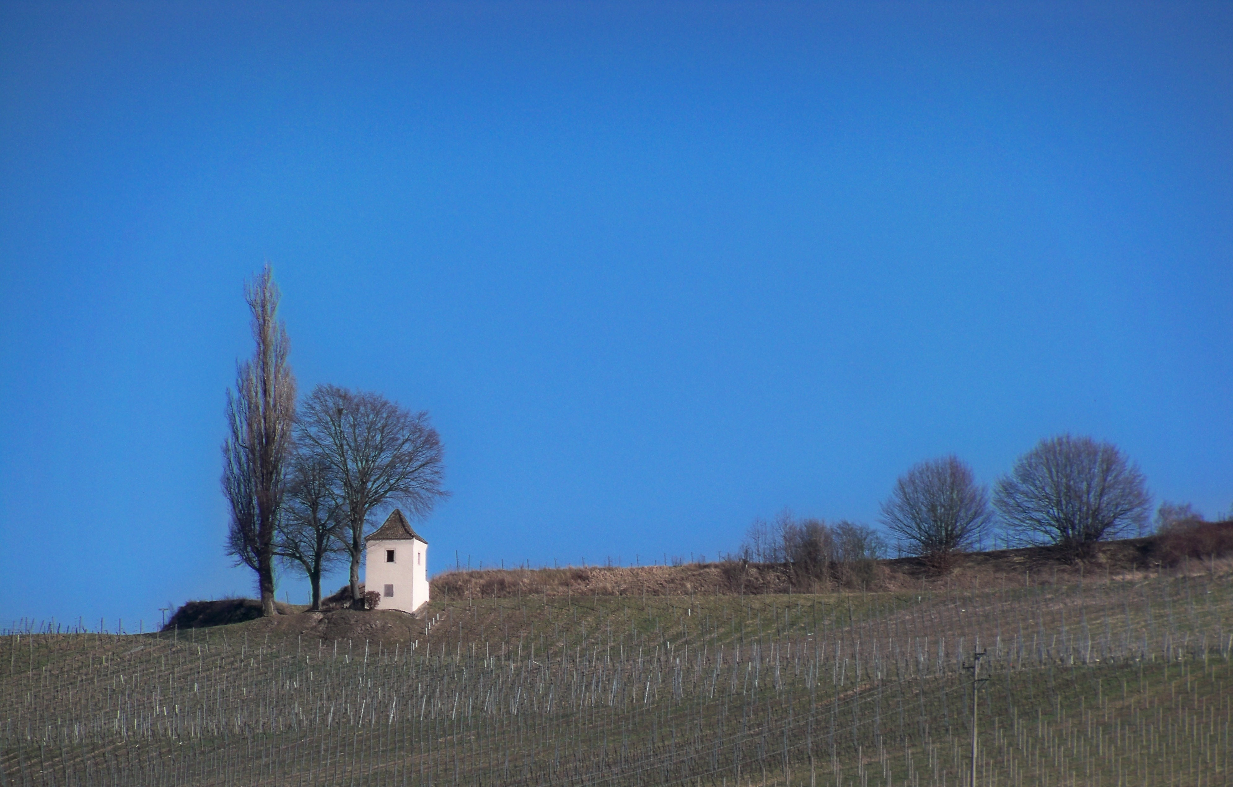 Vignoble du Pays de Bade, Markgräflerland, Mühlheim.